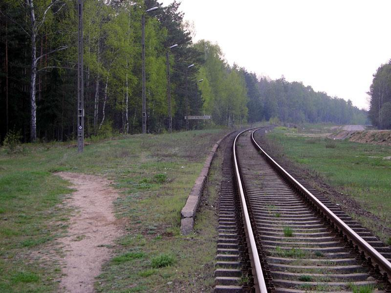 Peron przystanku PKP w Sokolem, który został wybudowany przez społeczeństwo wsi w czynie społecznym. Z prawej strony widoczna jest nowa droga, która została poświęcona dnia 7 sierpnia 2005 roku. Zdjęcie wykonano dnia 10 maja 2006 roku.